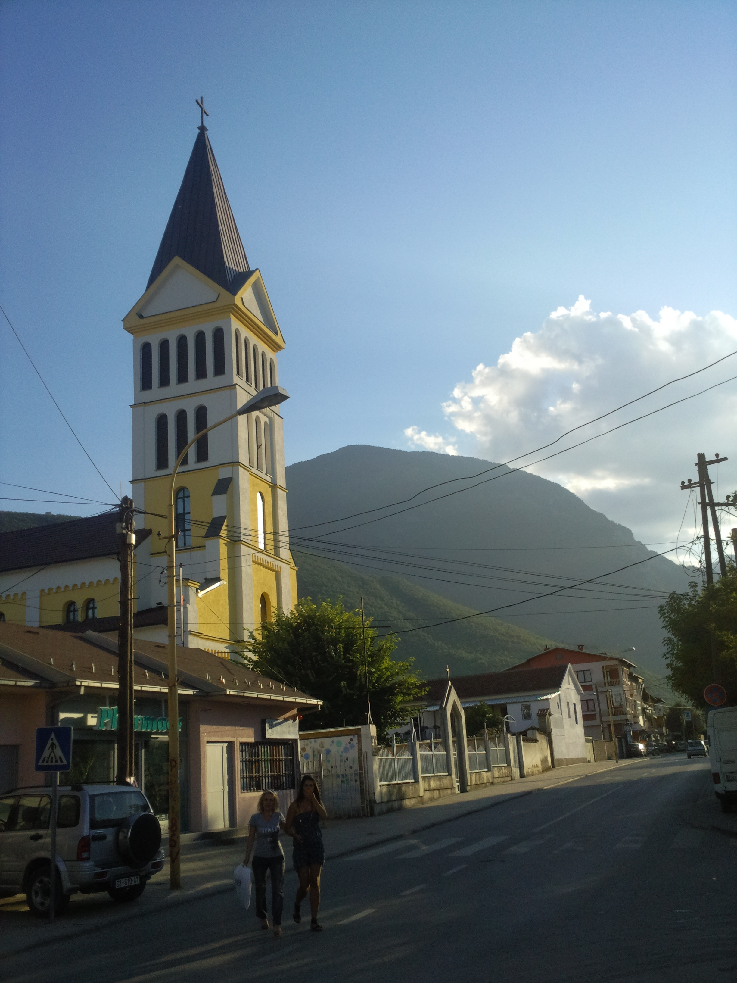 St. Katherina Kirche in Peja an der Mutter-Teresa (Rruga Nene Tereza)